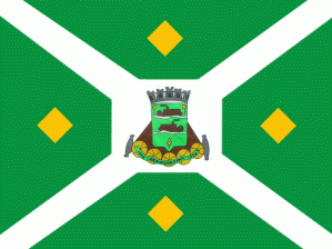 Bandeira do município de Araguatins, TO, Brasil.